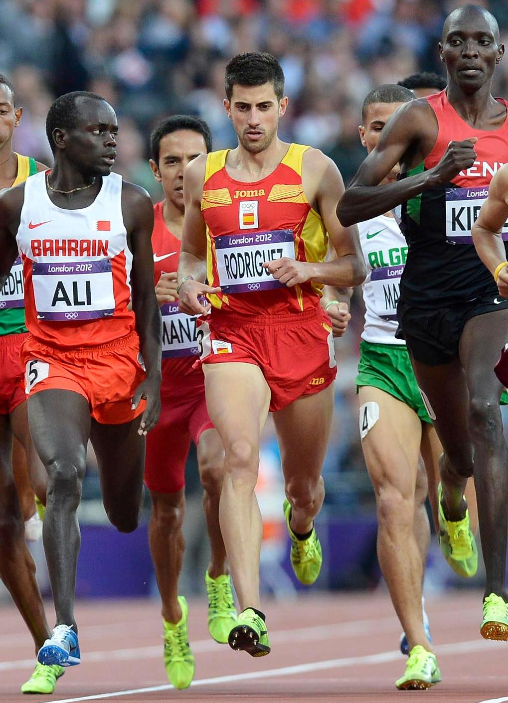 El atleta Álvaro Rodríguez en su eliminatoria de 1.500m de los Juegos Olímpicos de Londres 2012 en la que caería eliminado